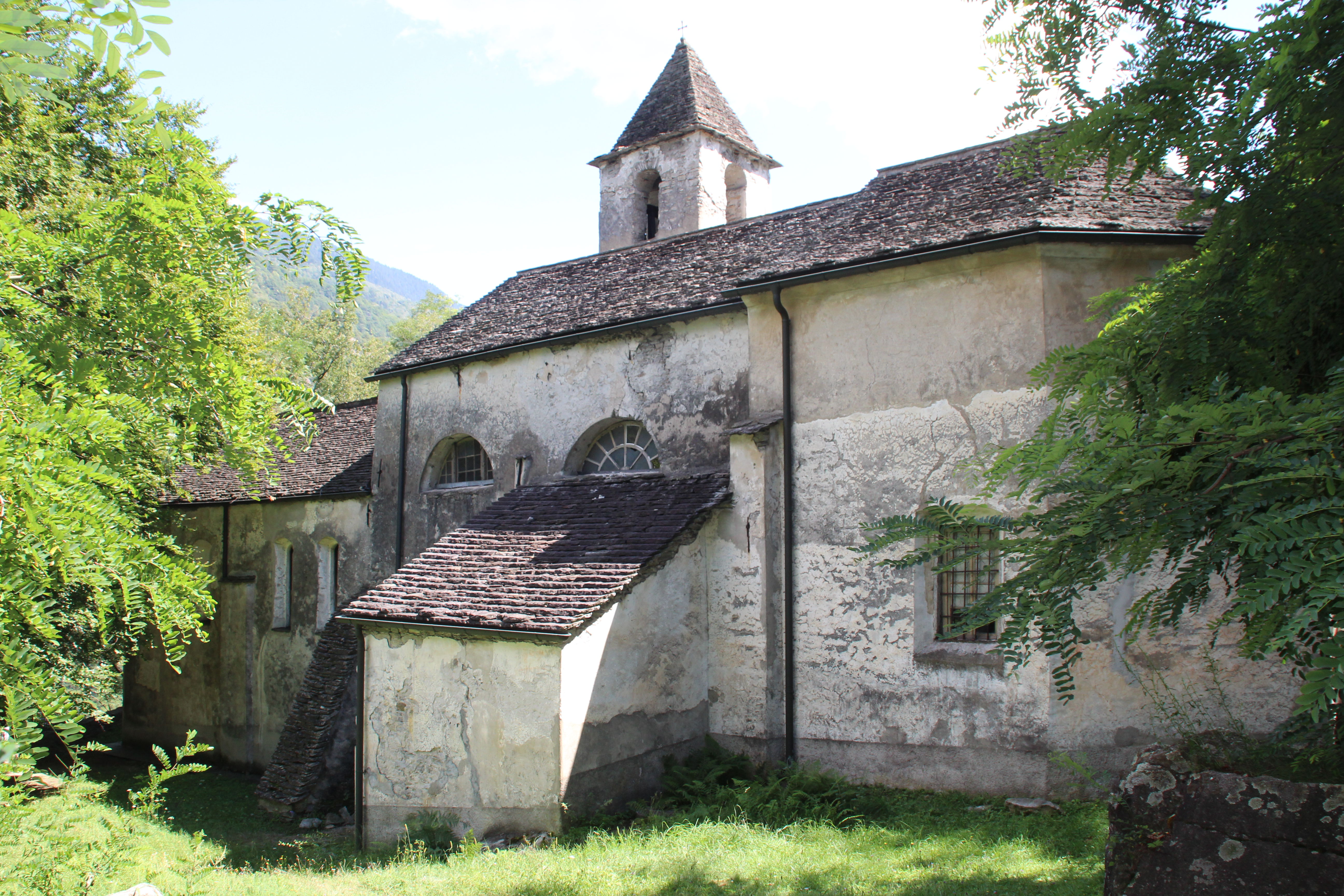 San Pellegrino (Giornico)